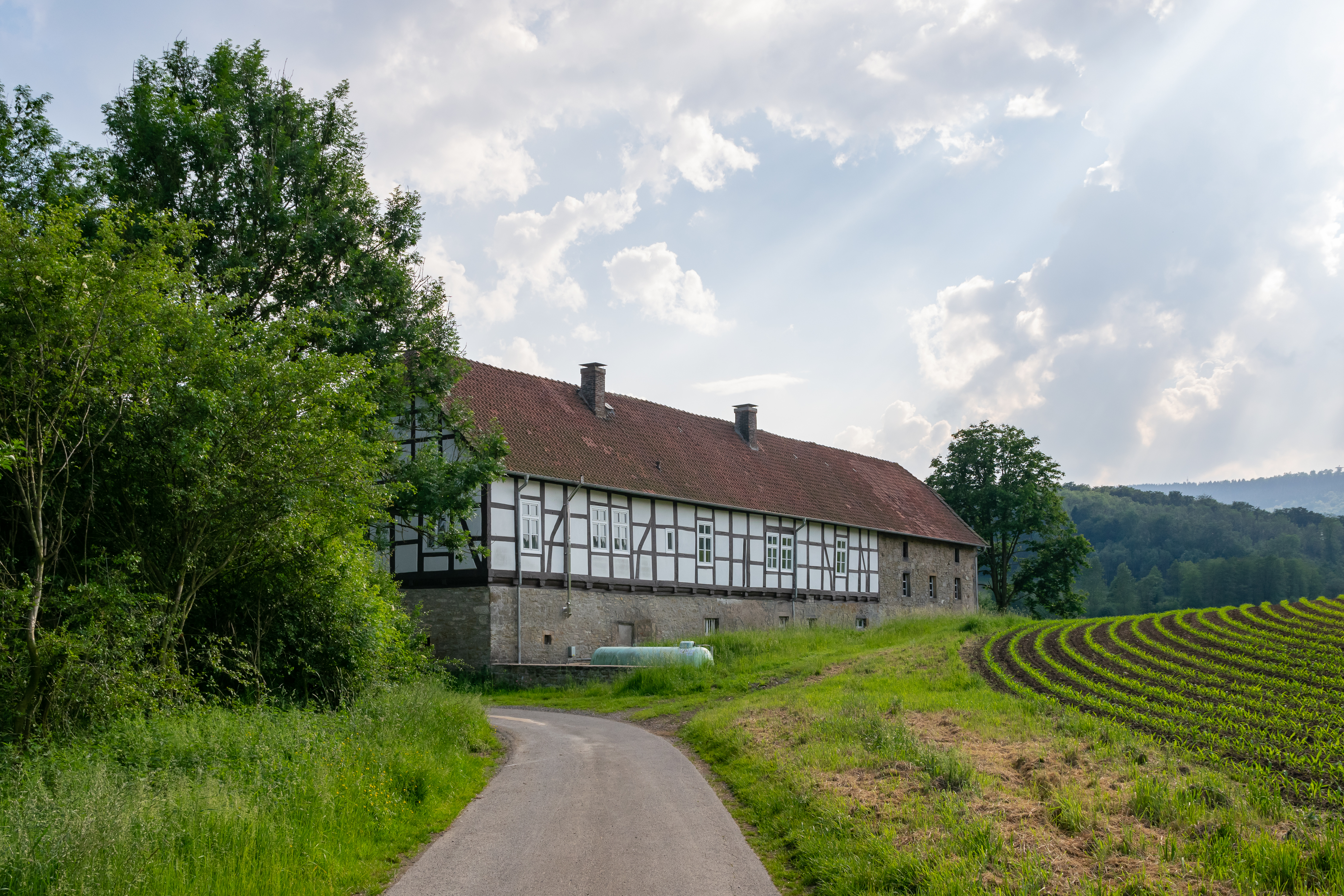 Gut Wintrup bei Steinheim-Sandebeck